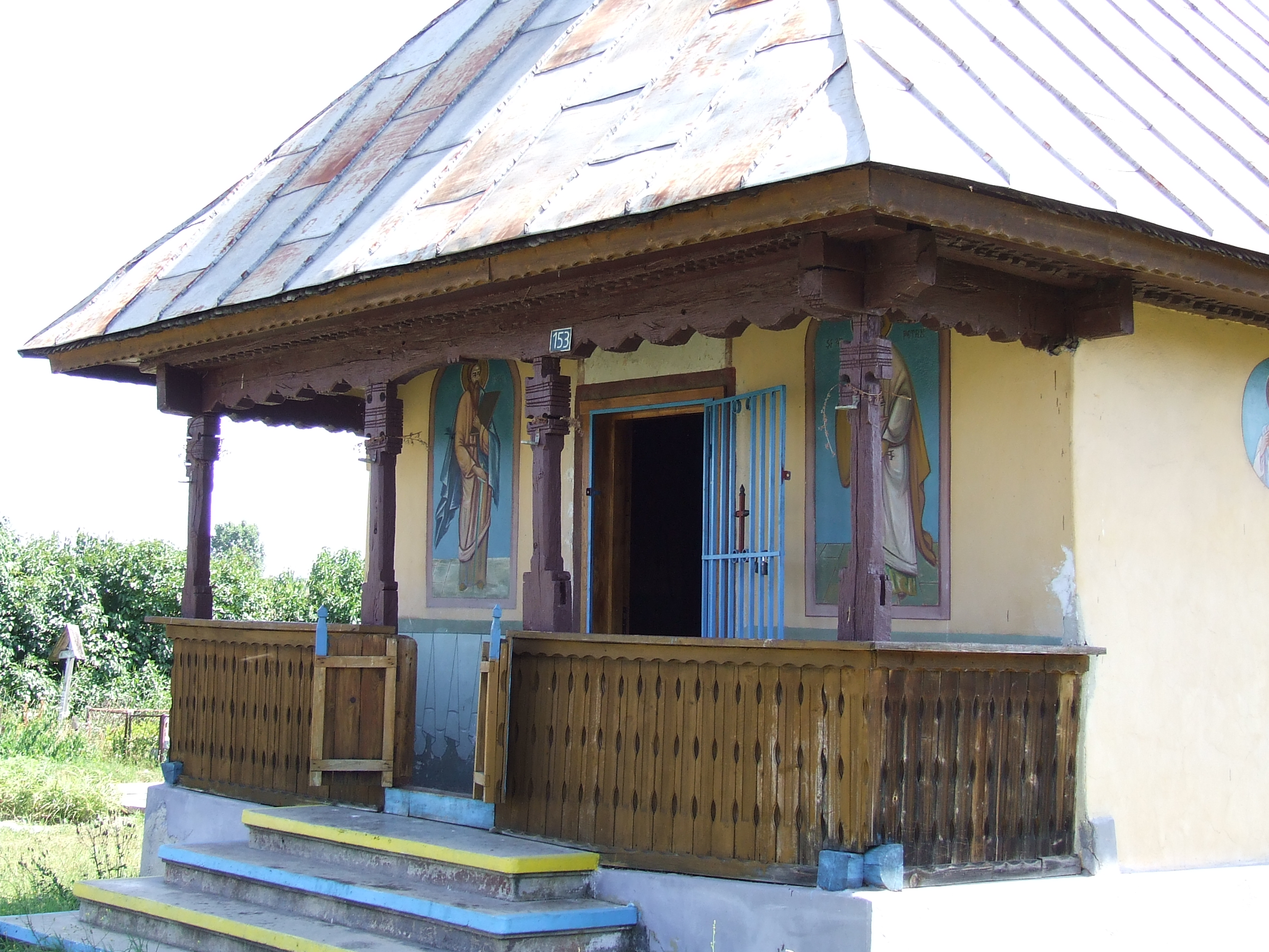 Biserica de lemn din Vidin, judeţul Gorj.